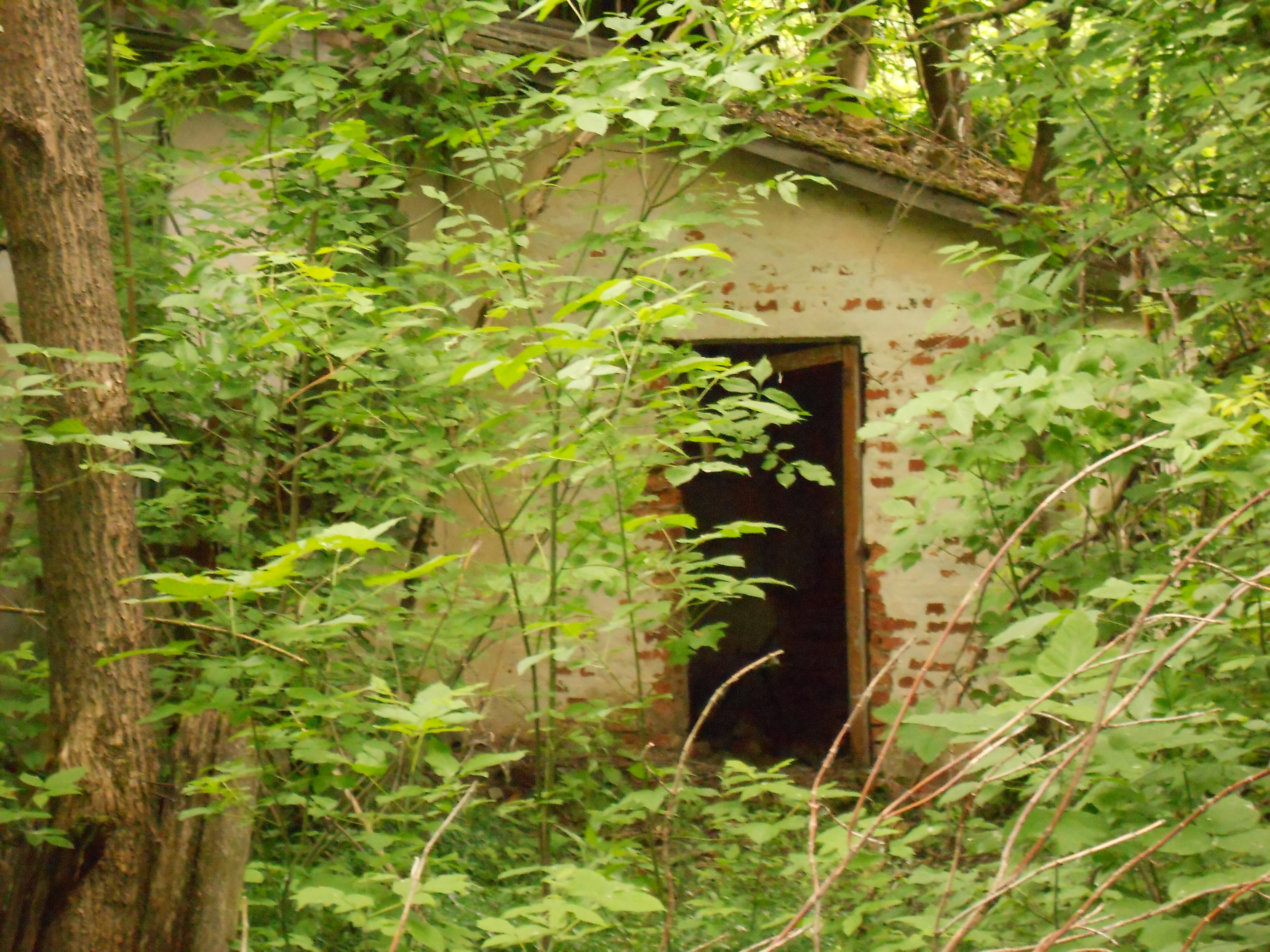 Покинута хата в с. Залісся